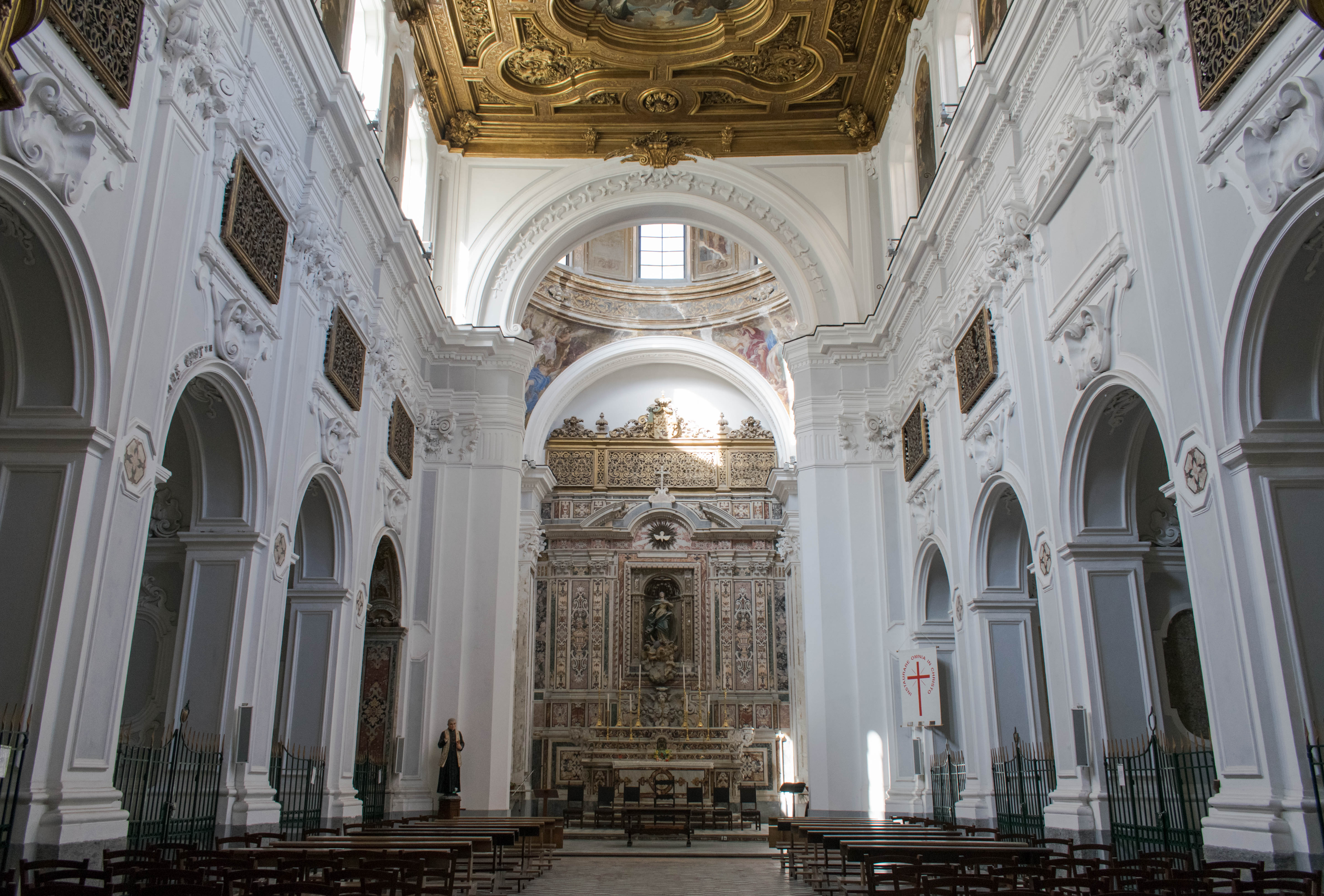 L'interno della Chiesa S. Maria Donnalbina, Napoli